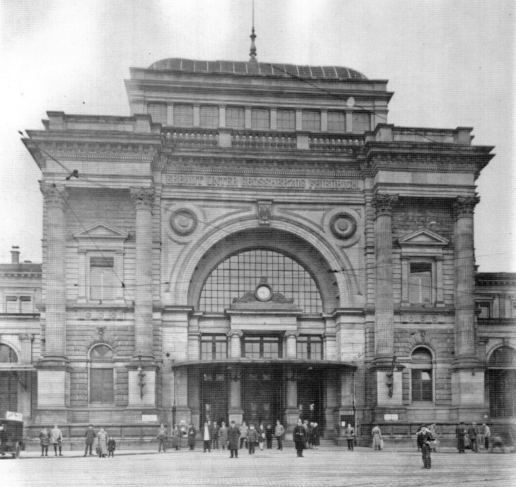 Mannheim, Hauptbahnhof, Mittelbau, um 1928